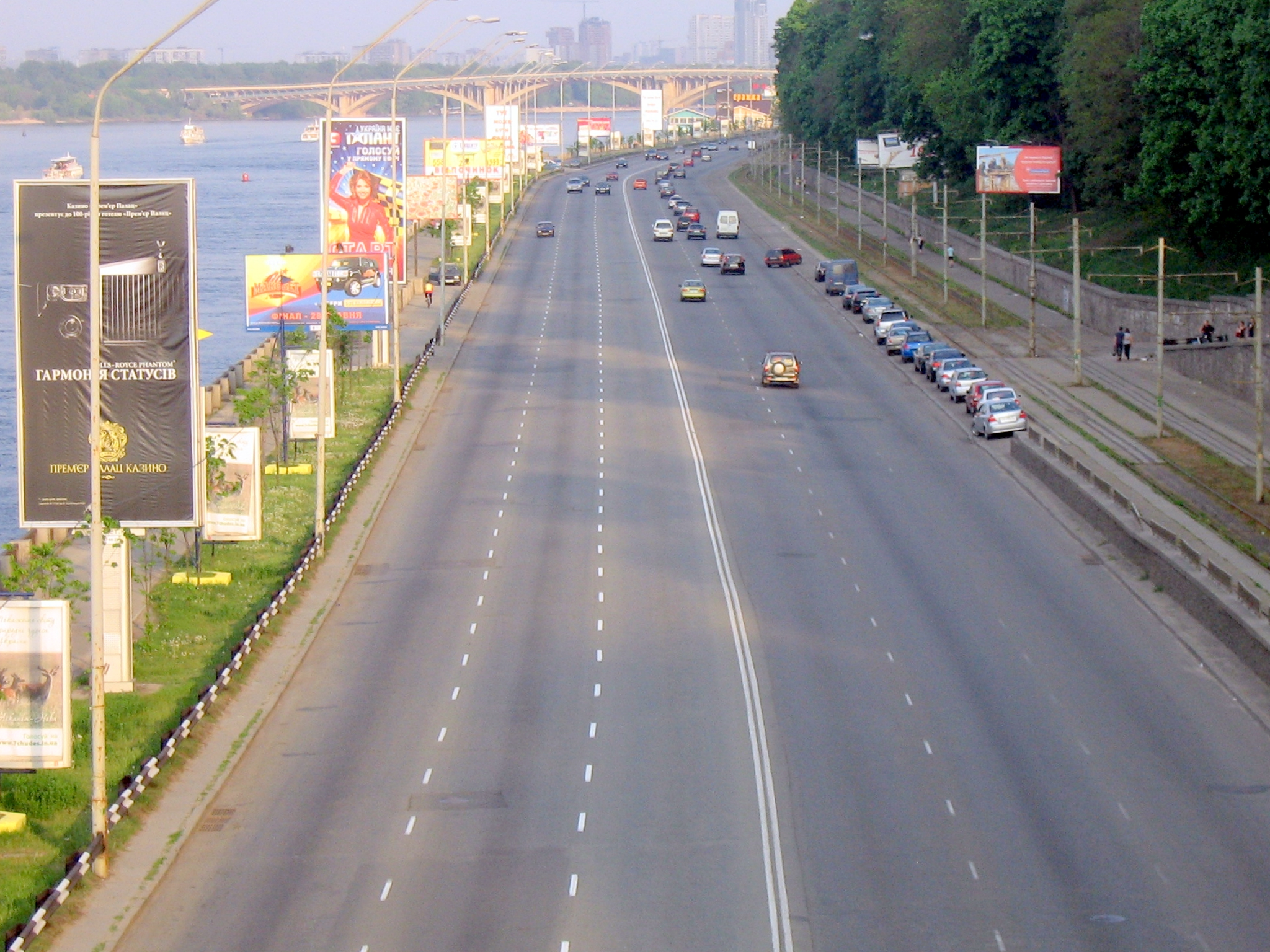 Набережне шосе